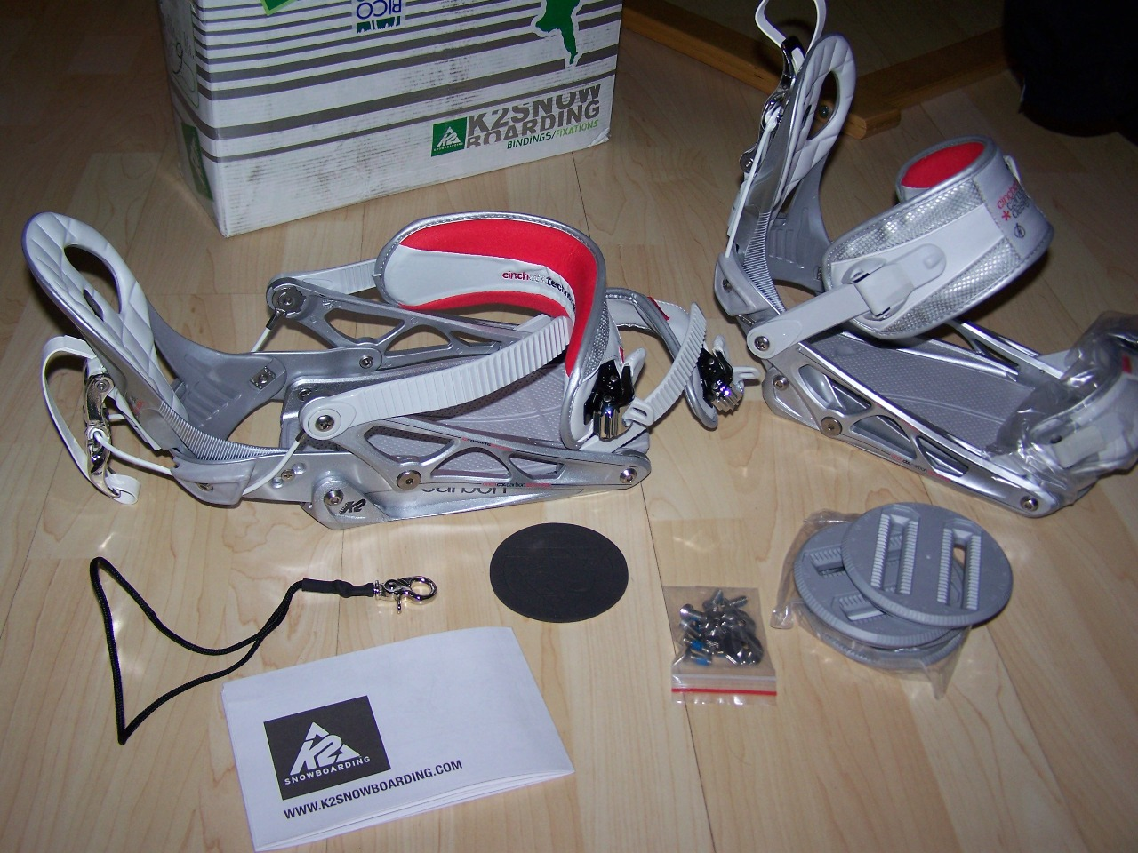 K2 Cinch CTX Snowboard-Bindung, rechts die Bindung mit angeklapptem, links mit herunter geklapptem Highback.